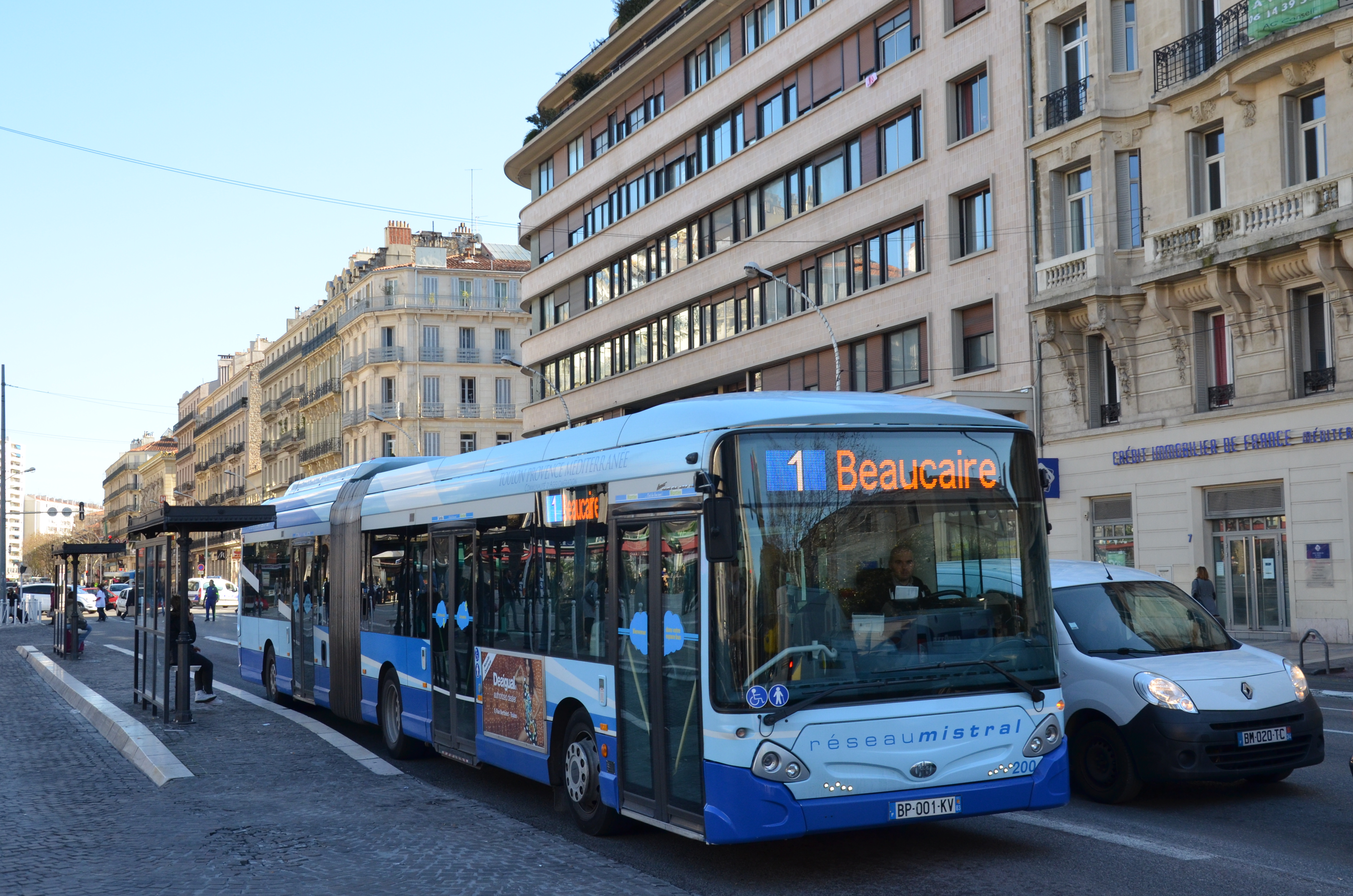 Heuliez GX 427 Hybride n°200 sur la ligne 1 du réseau Mistral, à l'arrêt Liberté.